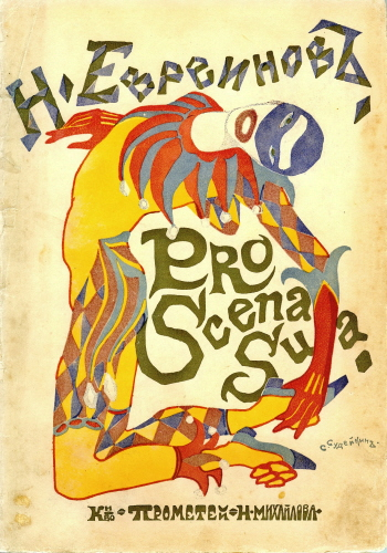 Title page of Nikolai Evreinov's Pro Scena Sua (1915)